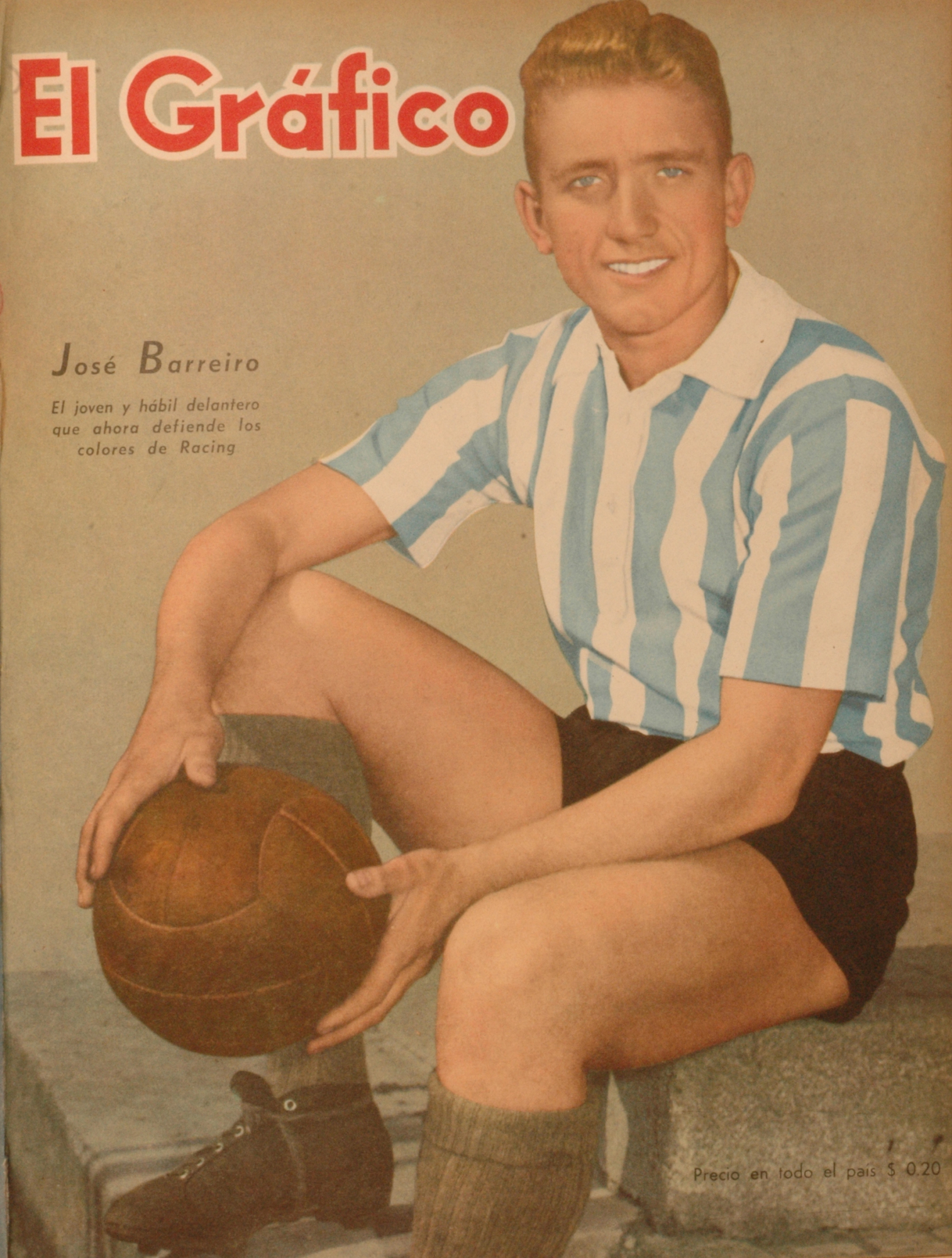 El Grafico del 21 de Abril de 1944. Edicion 1293